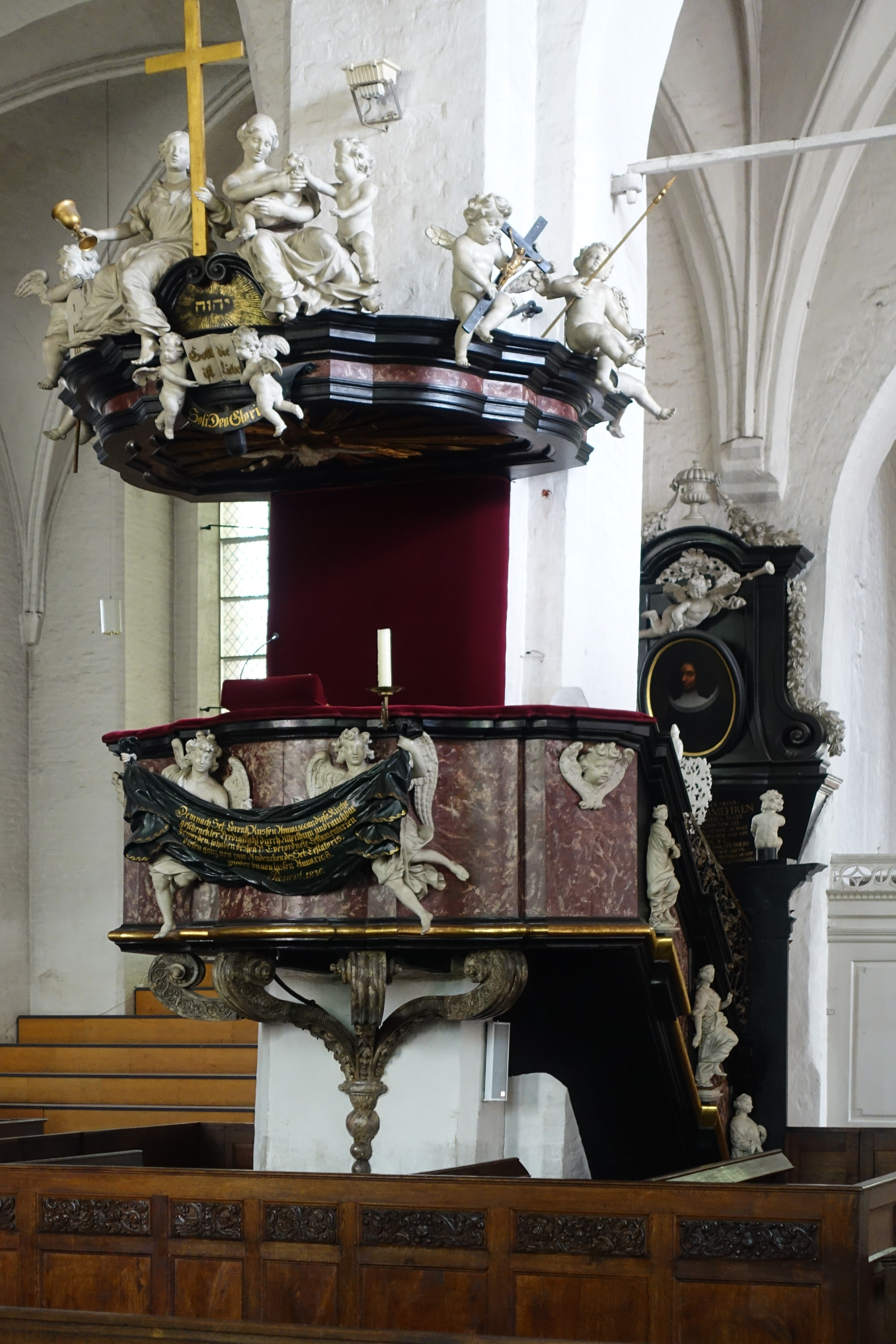 Kanzel in St. Aegidien (Lübeck), errichtet zwischen 1706 und 1708